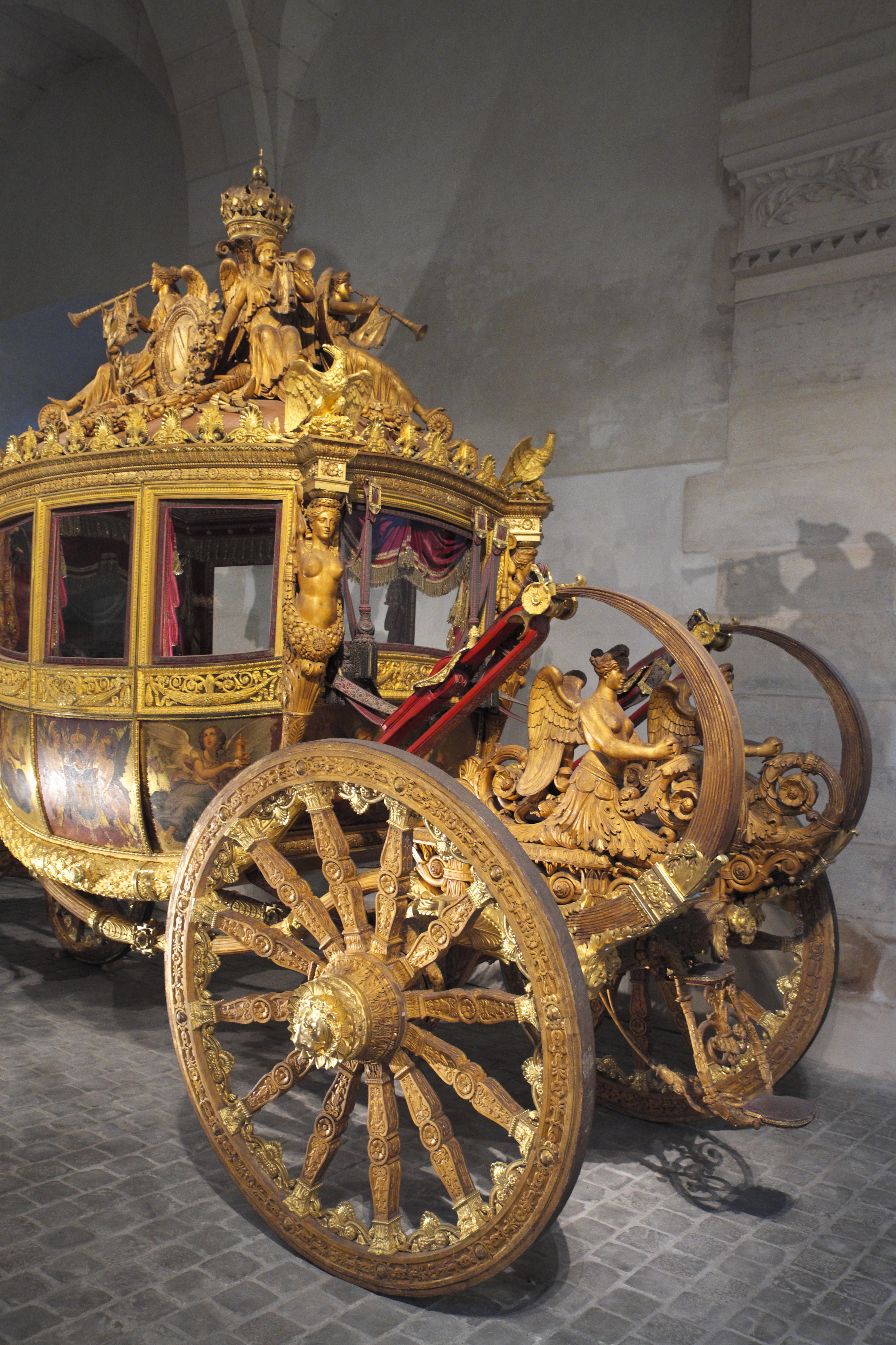 Kutschenmuseum, Galerie des Carosses, in der Grande Écurie des Schlosses von Versailles im Département Yvelines (Region Île-de-France/Frankreich), Kutsche für die Krönung von Karl X.